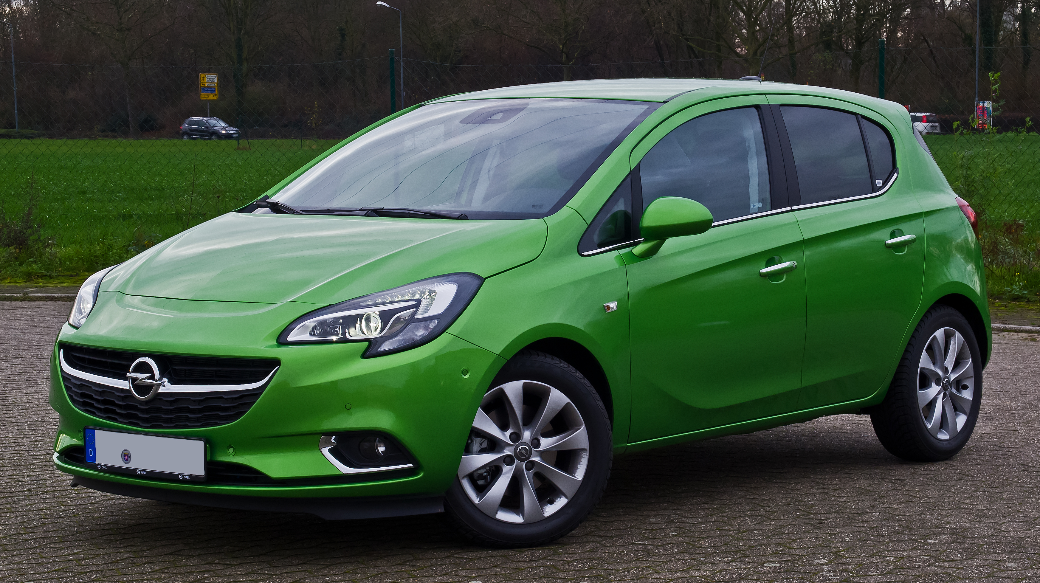 Opel Corsa 1.3 CDTI ecoFLEX Innovation (E)